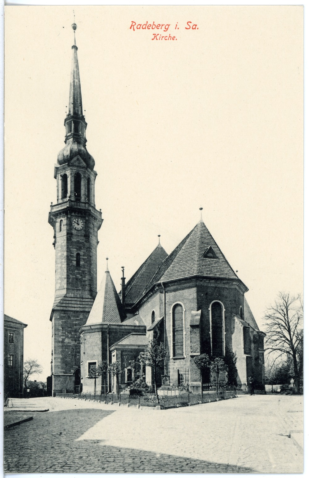 Radeberg; Kirche This postcard is from publisher Brück & Sohn in Meißen ( postcard has a unique number 17732 and is available in a higher resolution at the publisher. This images was uploaded in a cooperation project between Wikipedians and the publisher.